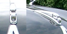 Borgward Hansa 2400 Limousine, Baujahr 1952. Fotografiert anläßlich des European Concours d'Elegance 2002 in SchwetzingenBorgward Hansa 2400 Limousine, Baujahr 1952. Fotografiert anläßlich des European Concours d'Elegance 2002 in Schwetzingen